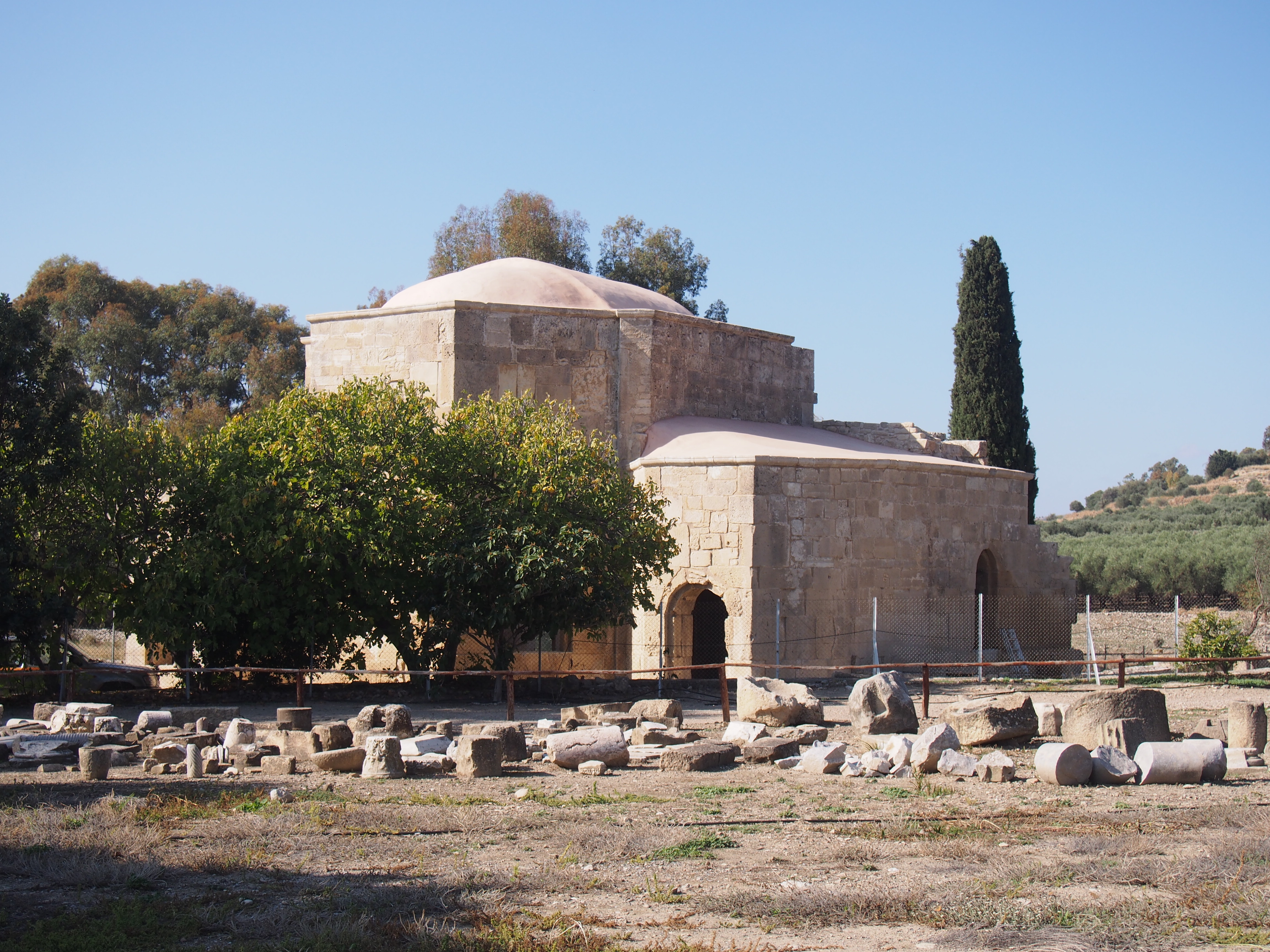 Ναός Αγίου Τίτου Γόρτυνας«Ναός Αγίου Τίτου Γόρτυνας»